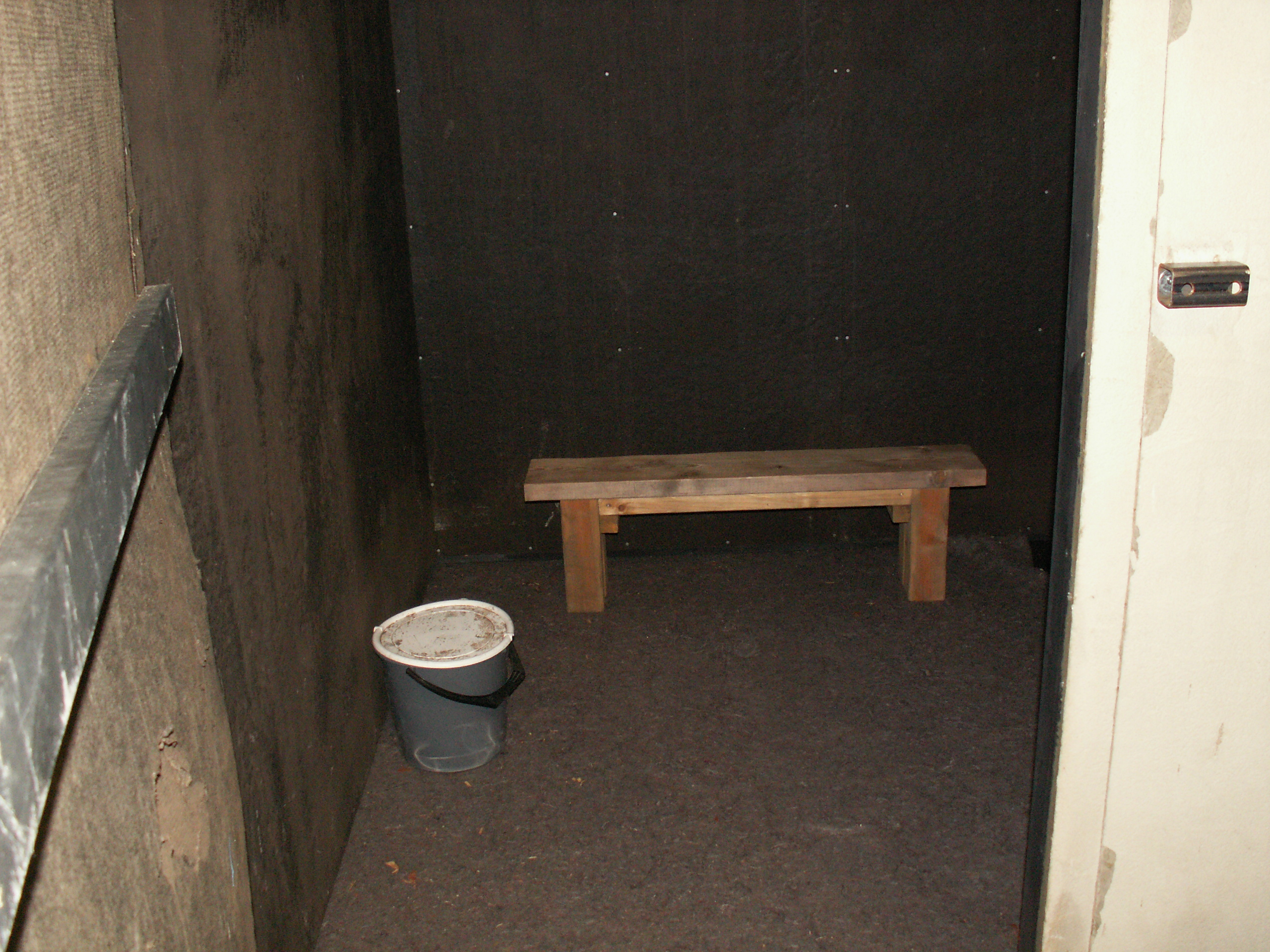 Uppbyggd kopia av Dawit Isaaks förmodade fängelse/cell i Eritrea. Utställd på Mediedagarna i Göteborg, mars 2015.